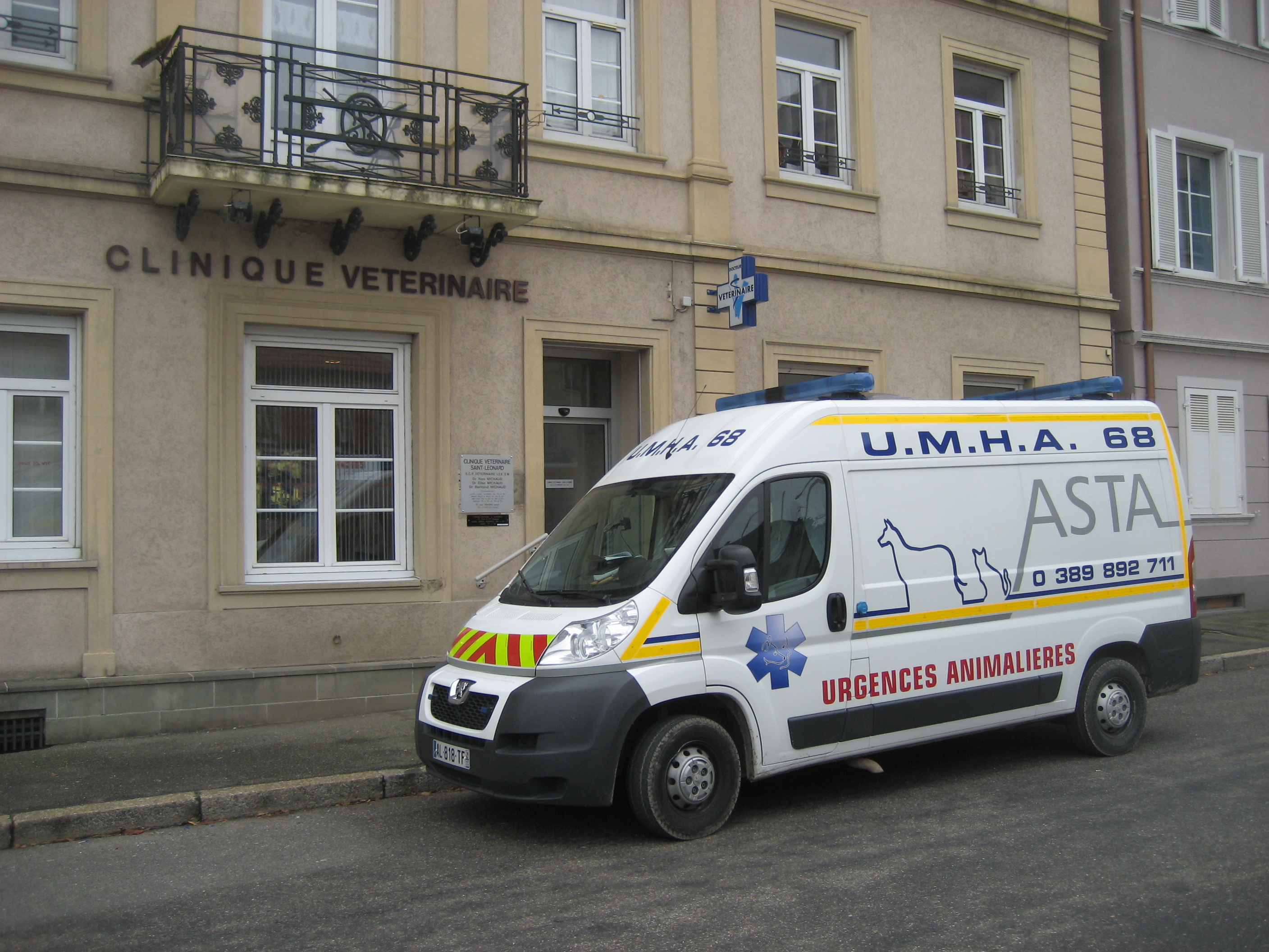 Equipage sanitaire à disposition d'un établissement de santé en médecine vétérinaire